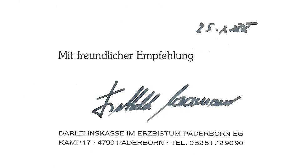 Visittenkarte mit Unterschrift von Berthold Naarmann vom 25.01.1988